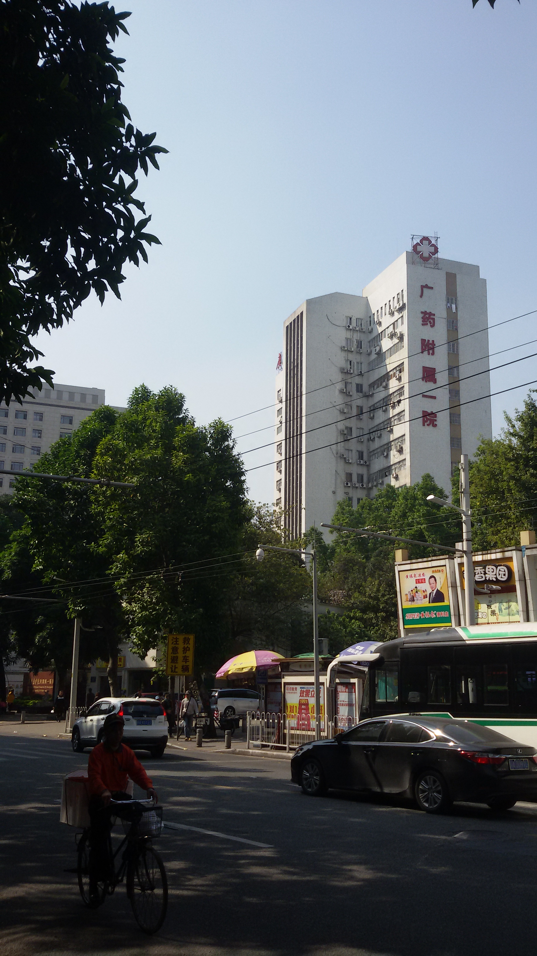 粵語: 广药附属一院